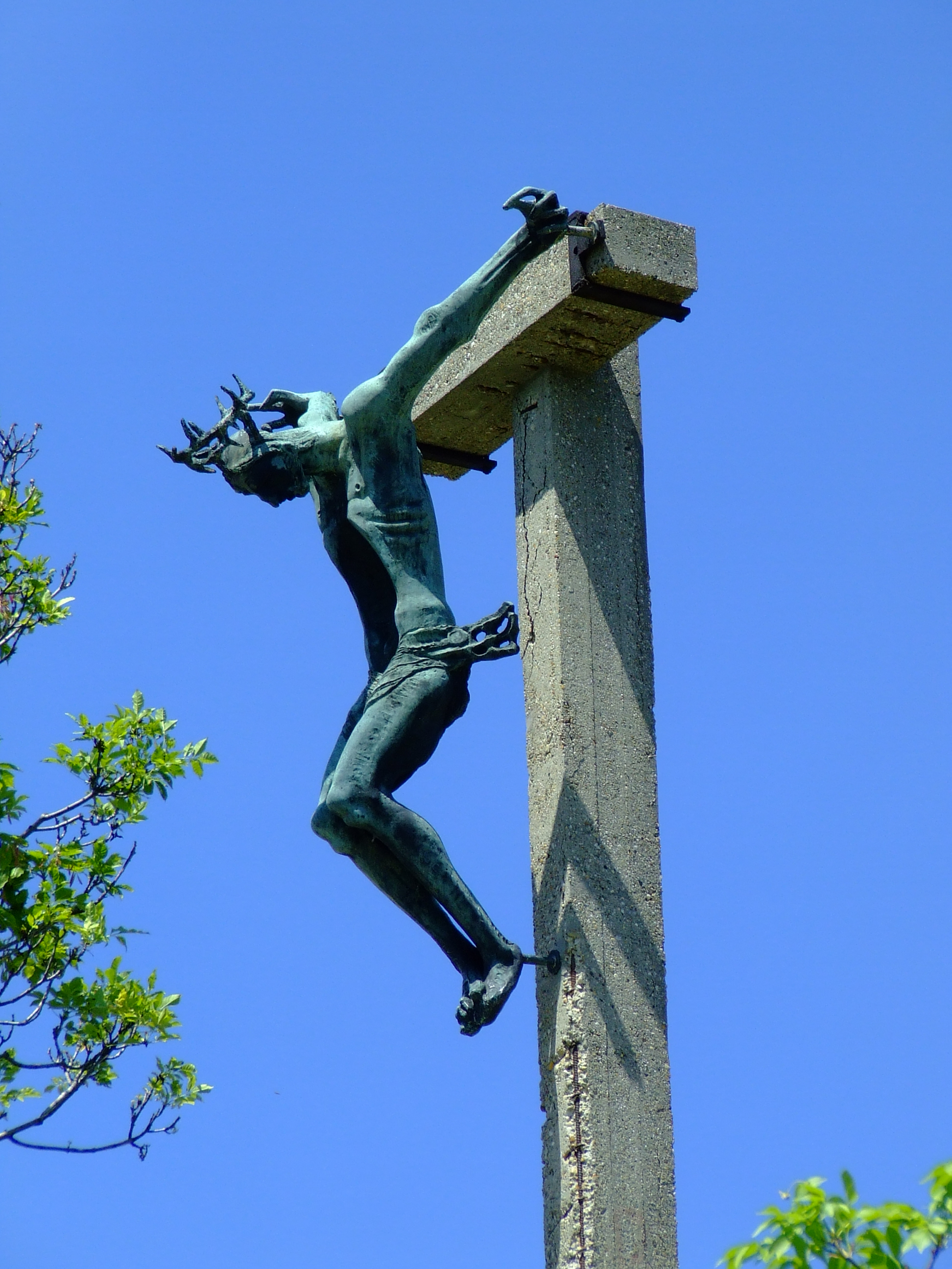 A tettyei kőkereszt. Rétfalvi Sándor szobrászművész alkotása